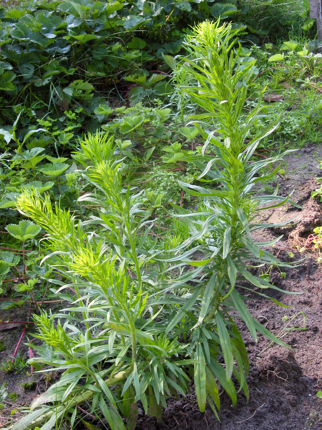 (nl: Canadese fijnstraal plant) Conyza canadensis